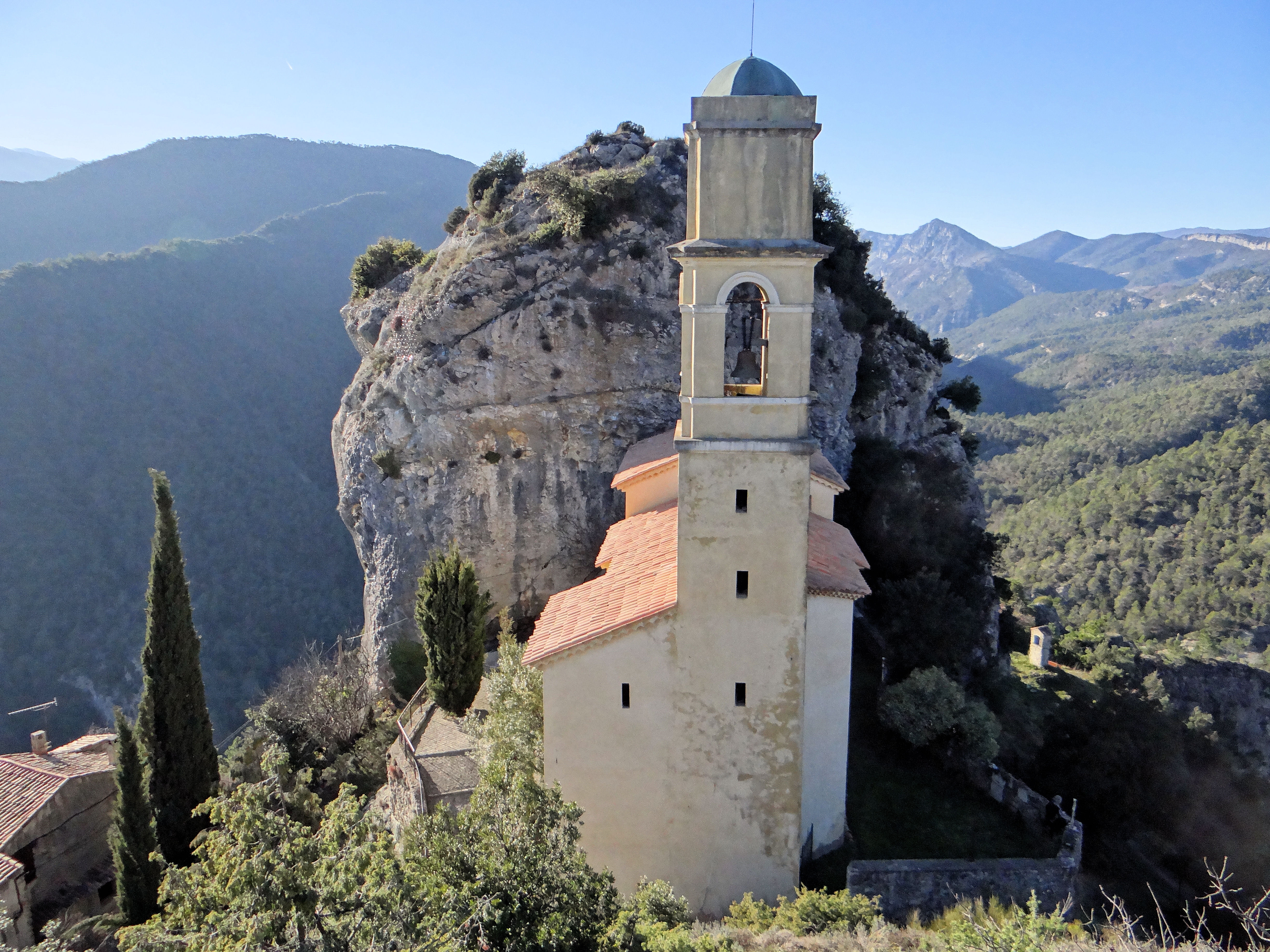 Pierrefeu - Église Saint-Sébastien-Saint-Martin de Vieux-Pierrefeu - Le clocher à l'est